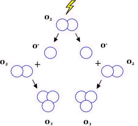 Vznik ozonu z molekuly kyslíku Zdroj